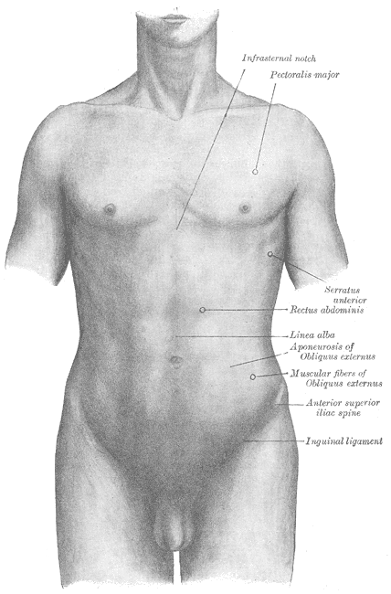 abdomen front surface